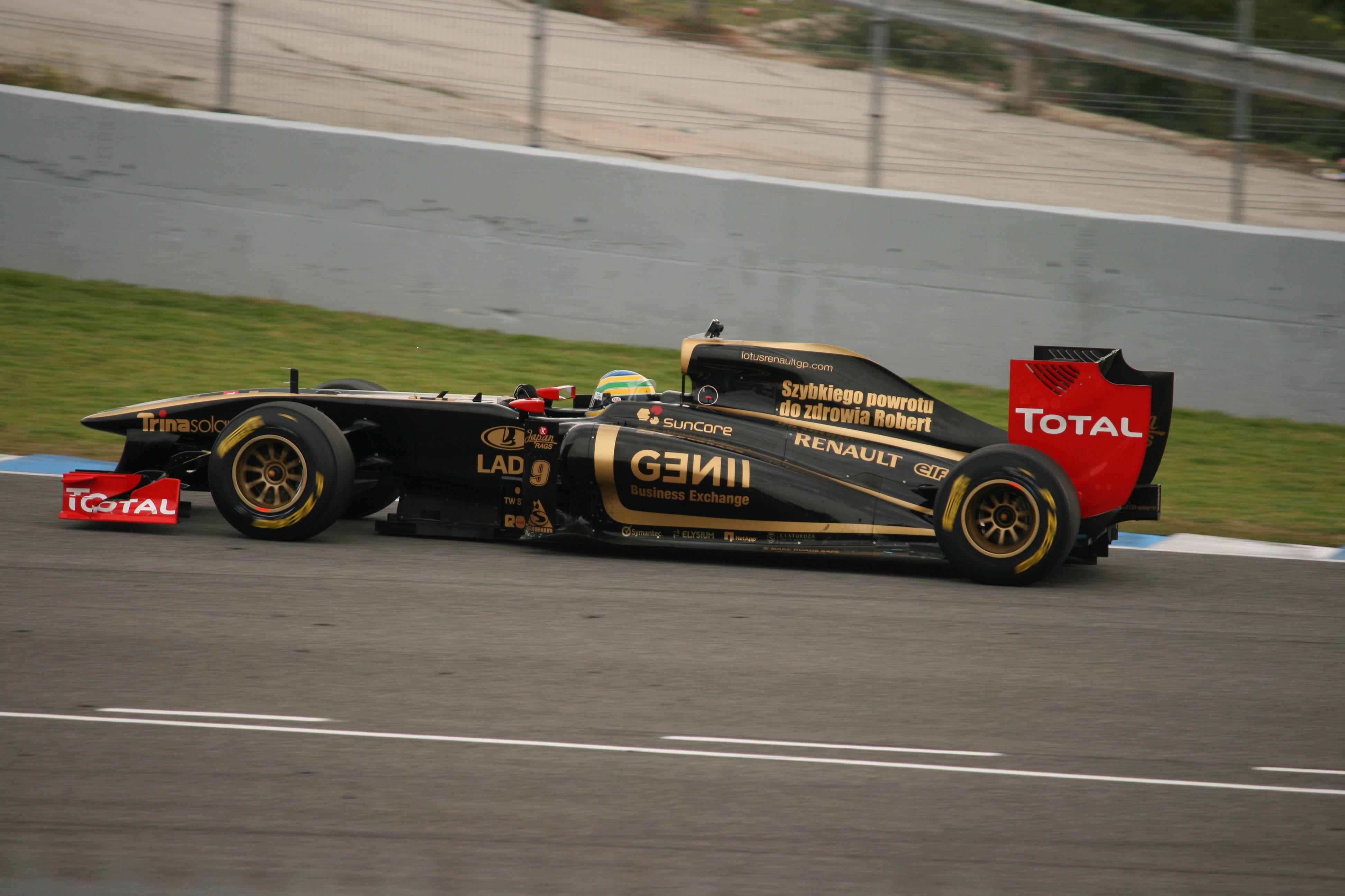 Bruno Senna